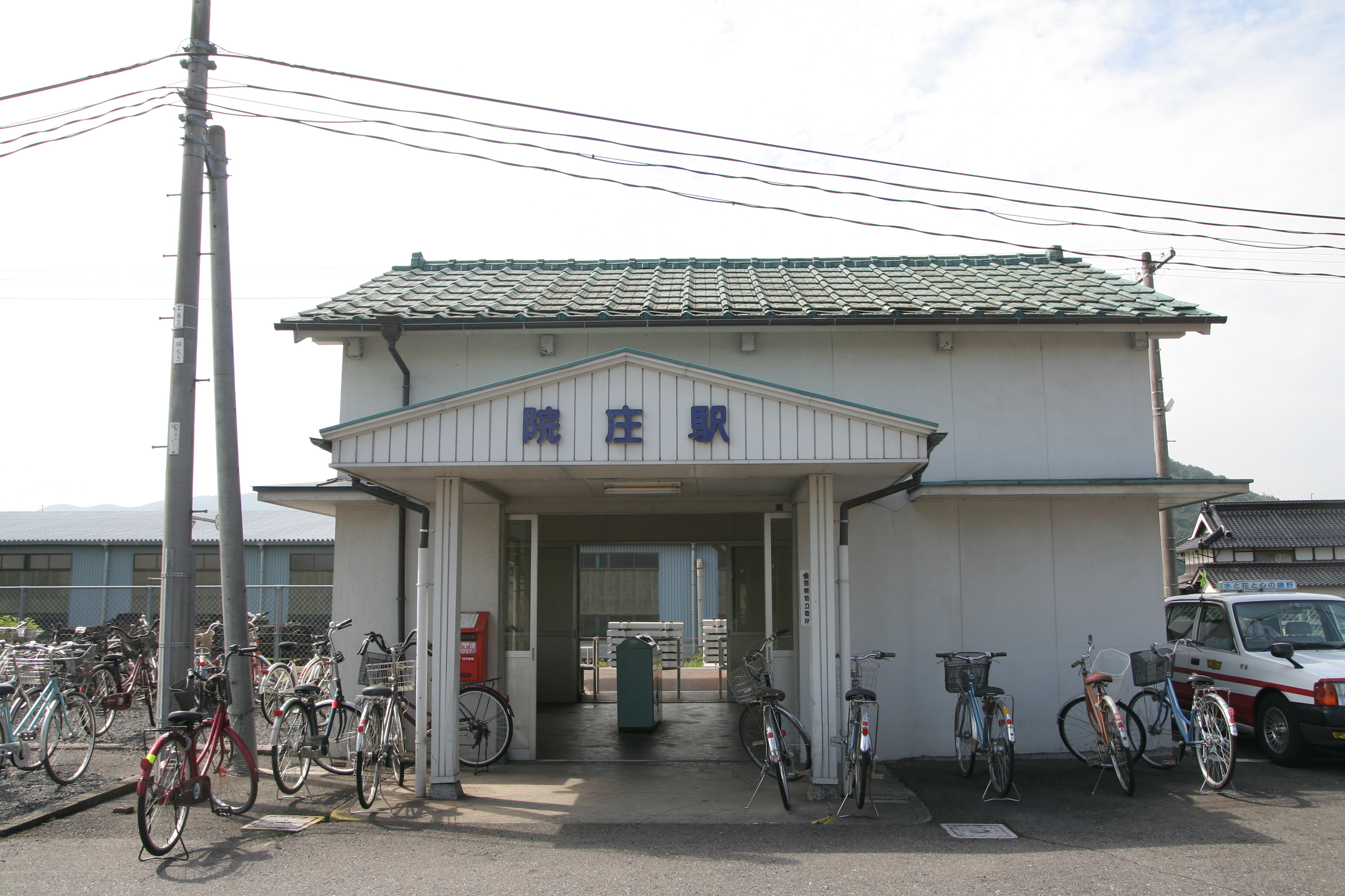 姫新線、院庄駅の駅舎